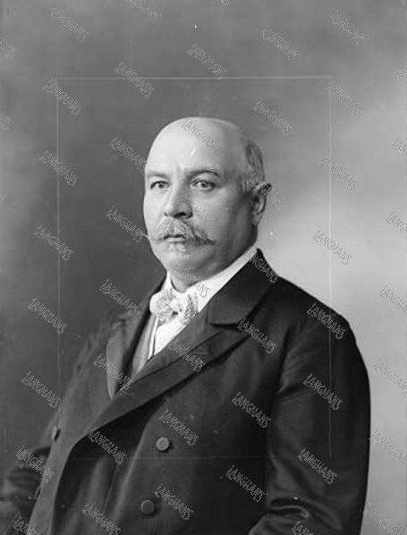 Hornof Jindřich (1858-1925), rakouský odborový předák a politik české národnosti